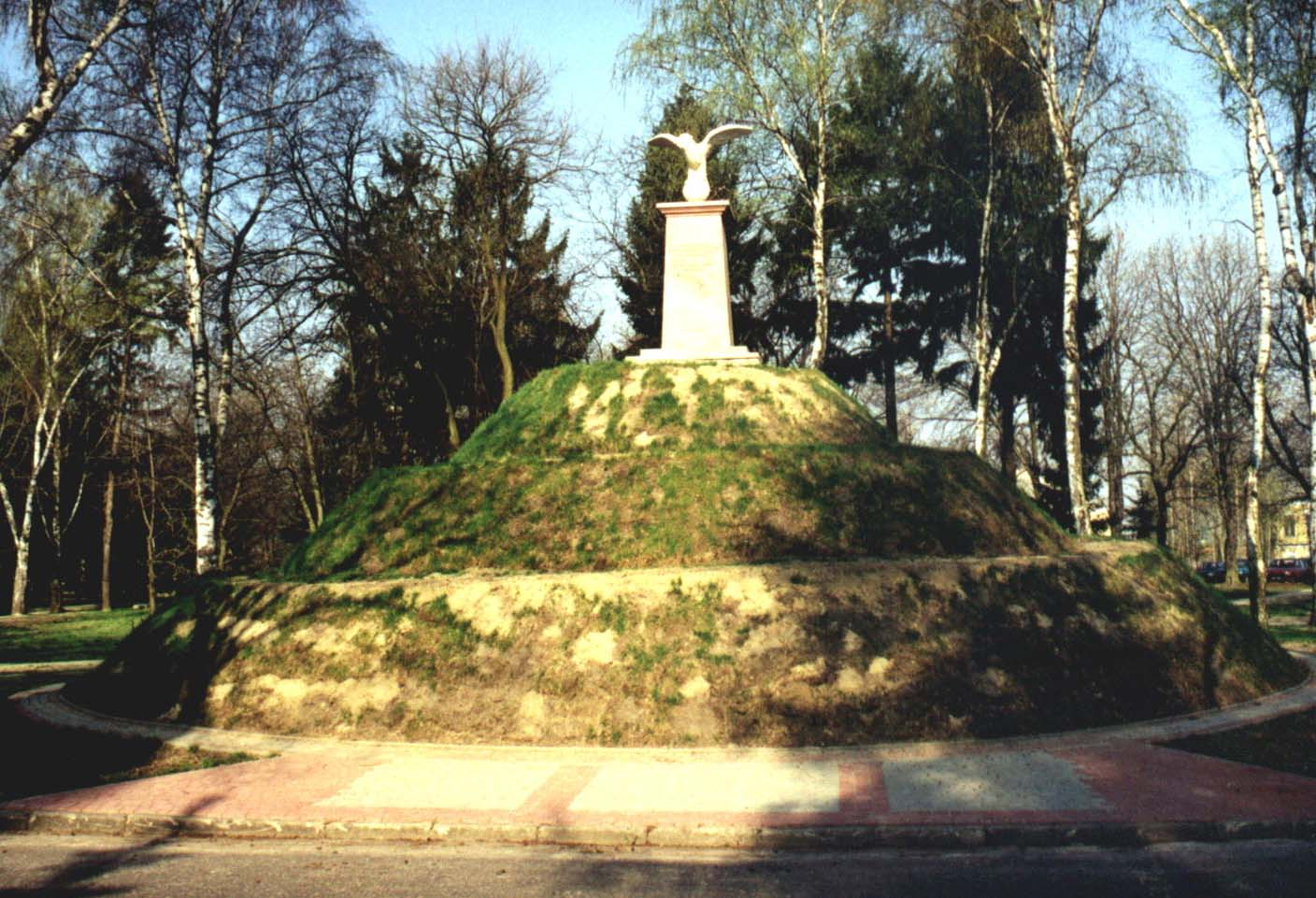 Kopiec Legionów w Lublinie, na terenie jednostki wojskowej przy Al. Racławickich. Odsłonięty: 15 VIII 2001, autor obelisku i figury: Witold Marcewicz